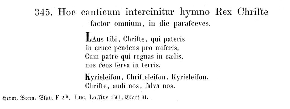 Laus tibi, Christe, qui pateris, Hymnus am Karfreitag, Erstbeleg Salzburg um 1350, Edition Philipp Wackernagel 1864